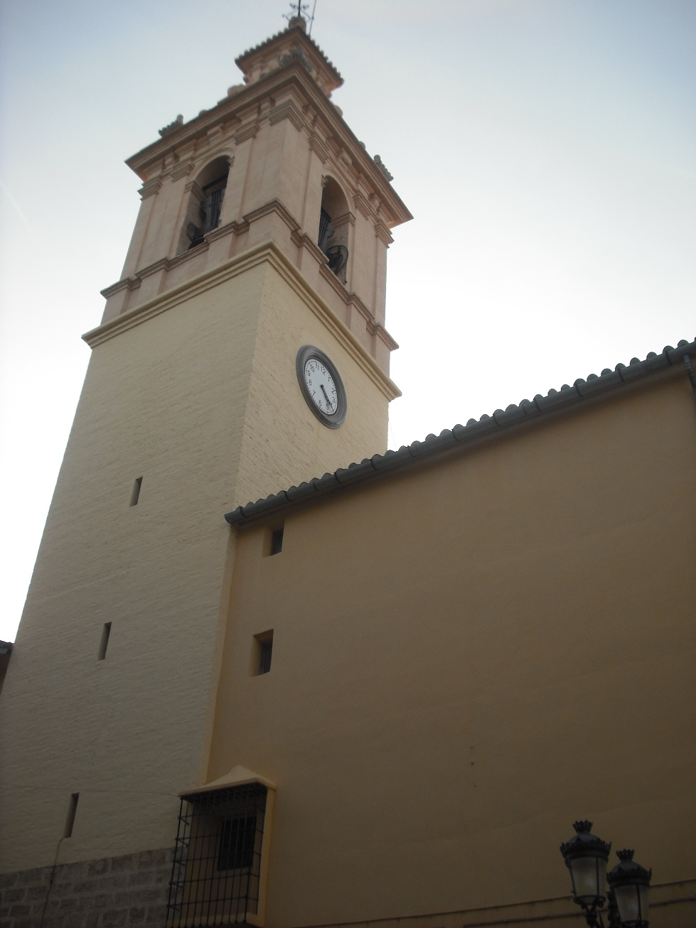 Torre de la Iglesia de Santiago de Moncada.